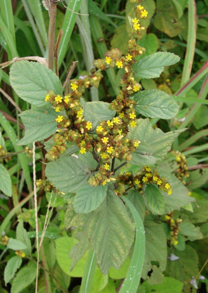 Waltheria americana L. - MALVACEAE - BR 242 - Barreiras - Bahia - Brasil.